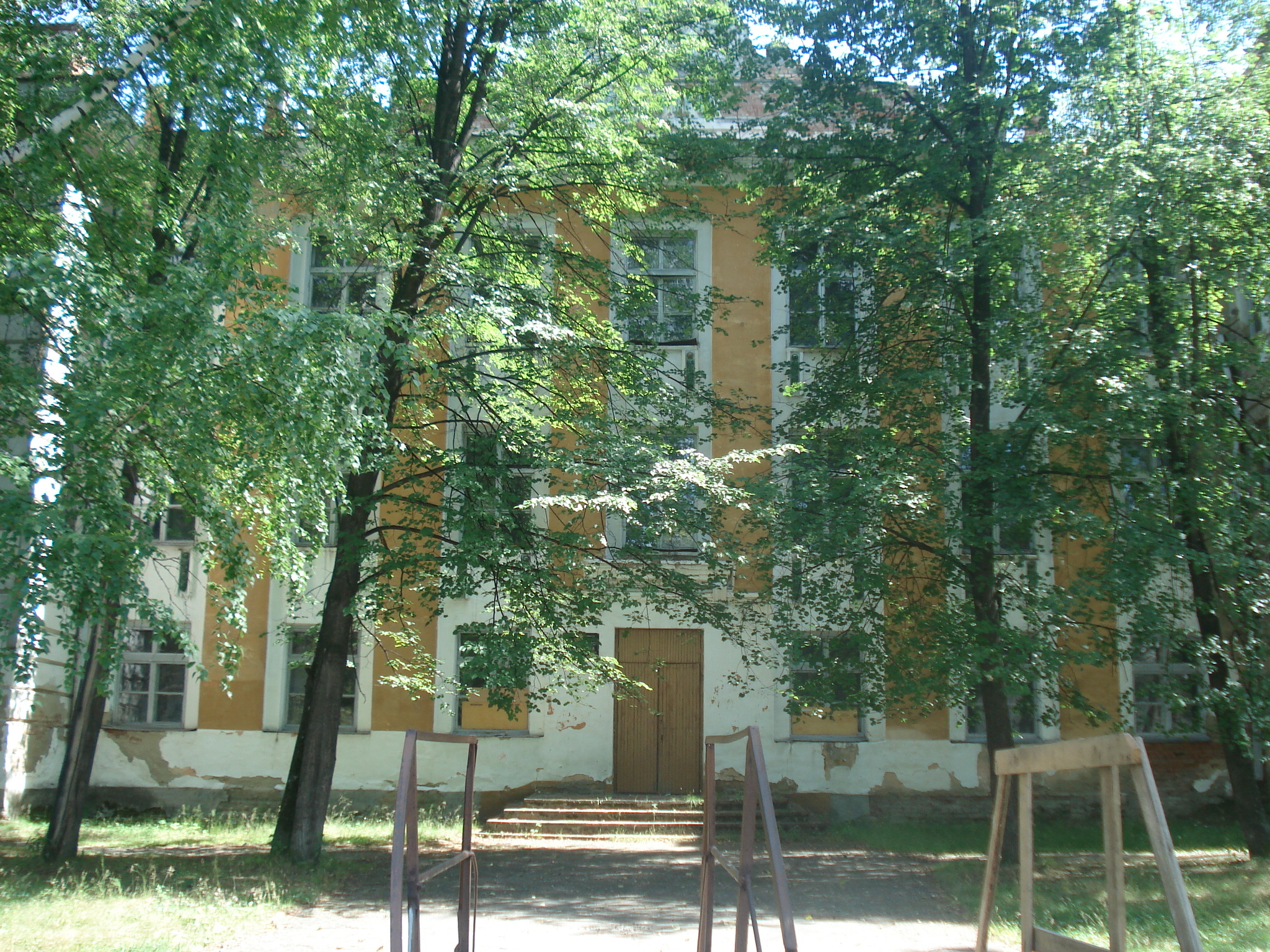 Средняя общеобразовательная школа №24 п. Кедровое